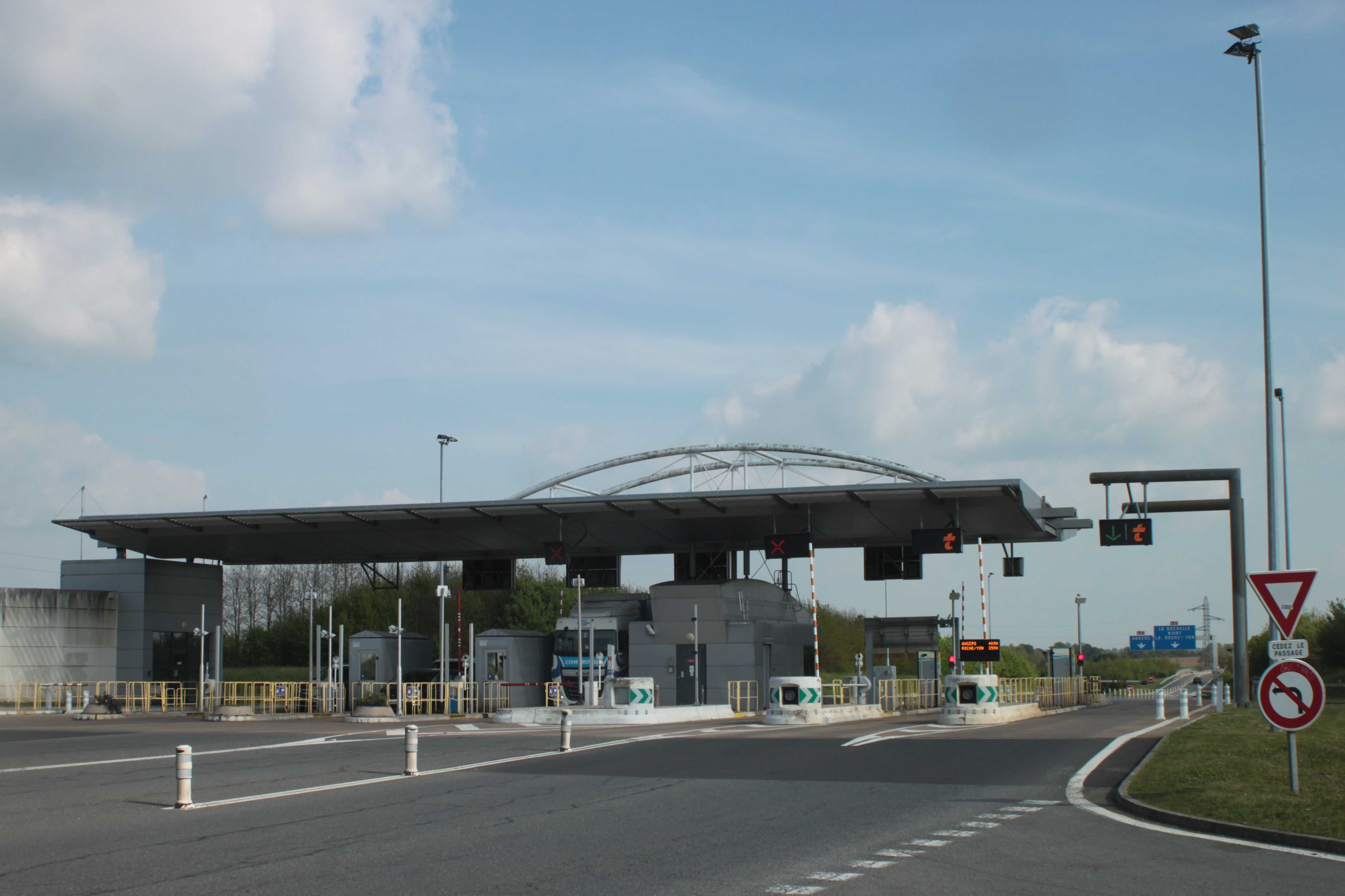 Péage Cholet-sud, A87, Fr-49-Cholet.